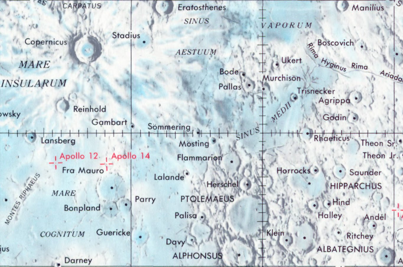 Cráter lunar Sömmering. Localización. (Lunar Chart LPC1. Second Edition)